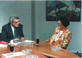 Carolina-Dafne Alonso-Cortés, entrevistada en TVE con motivo del centenario de Agatha Christie